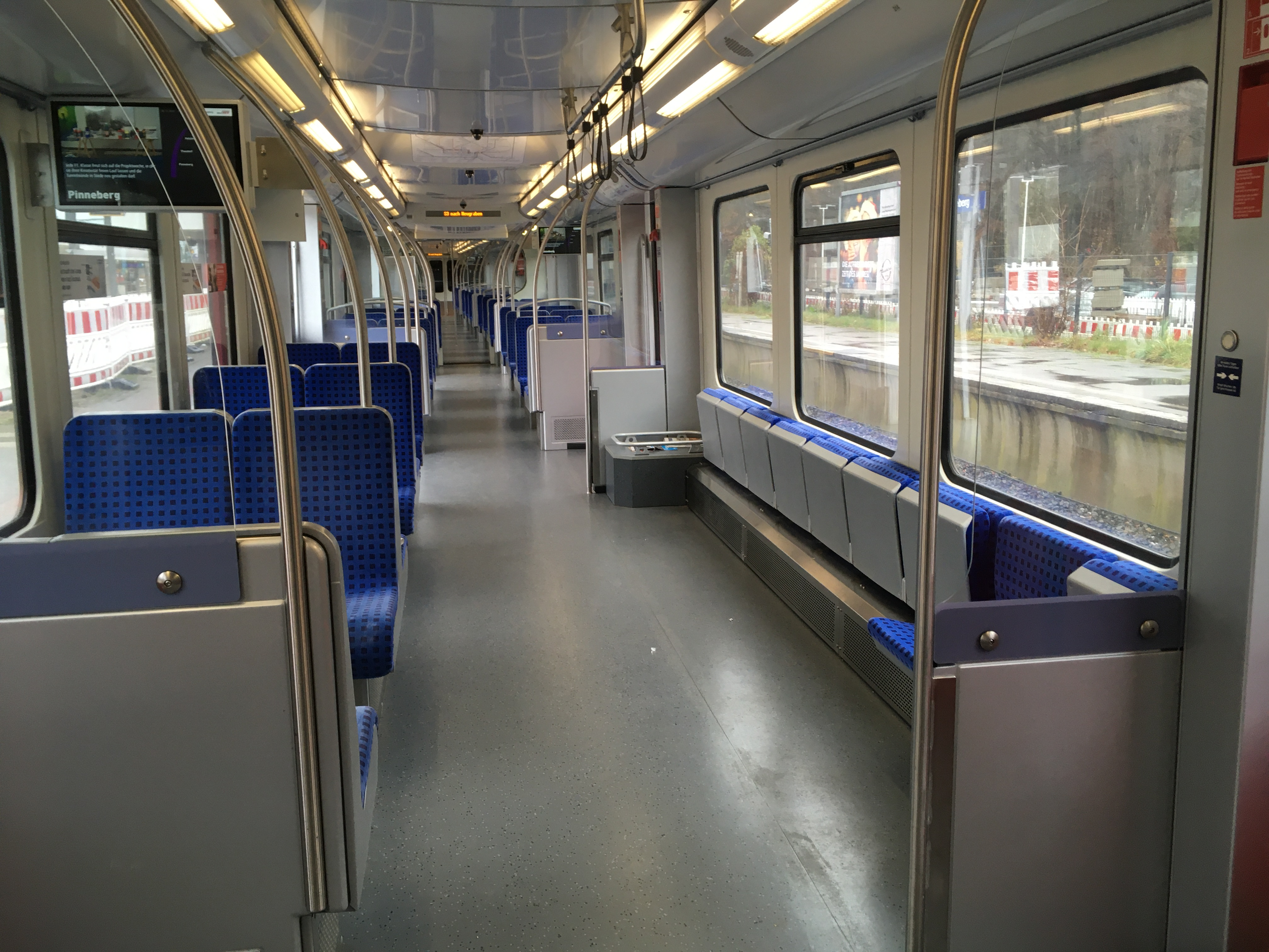 Ein modernisierter Triebwagen der Baureihe 474 mit Durchgängen, Mehrzweckabteil und Fahrgastinformationssystem.